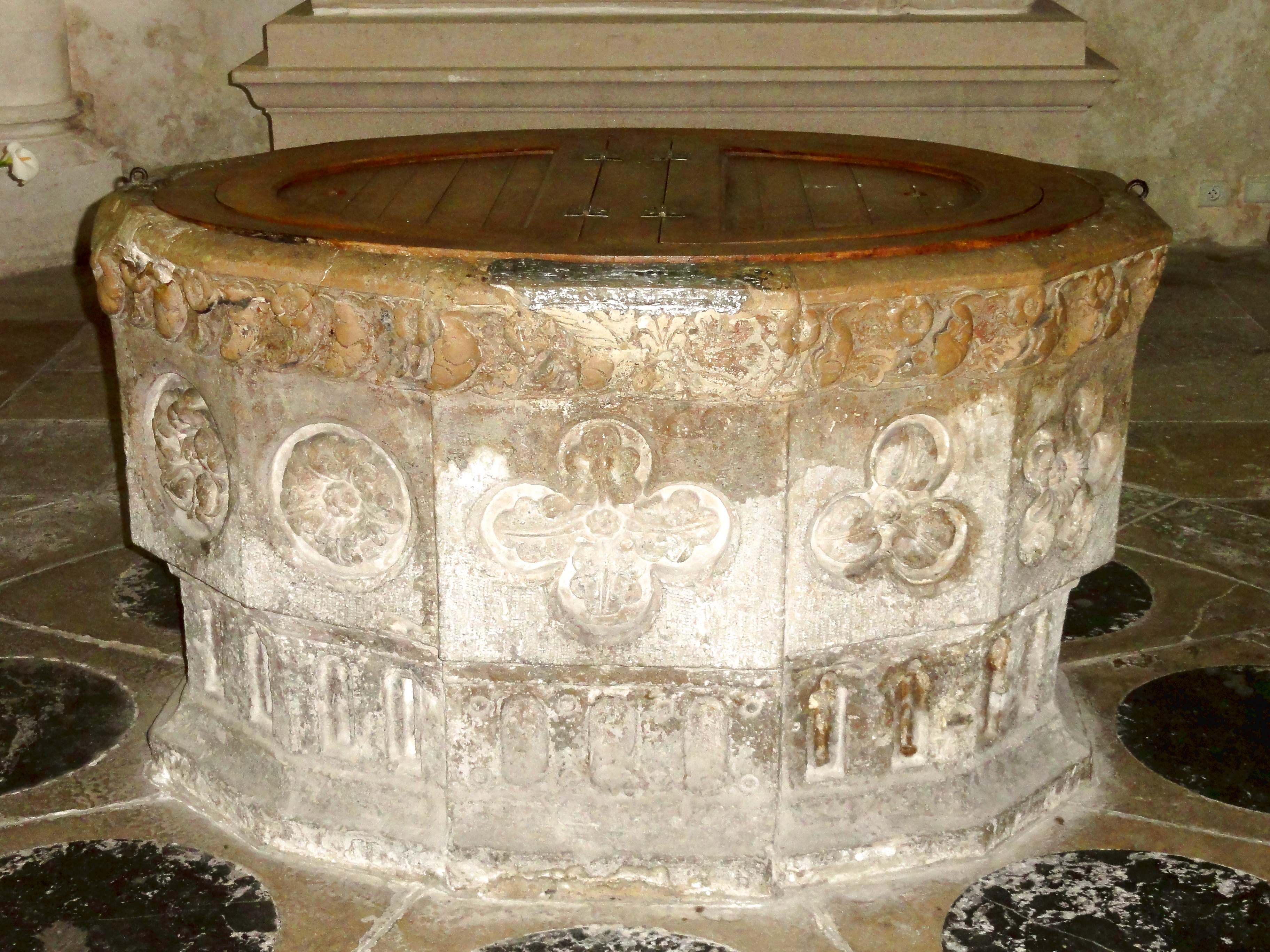 Mobilier de l'église - voir titre.